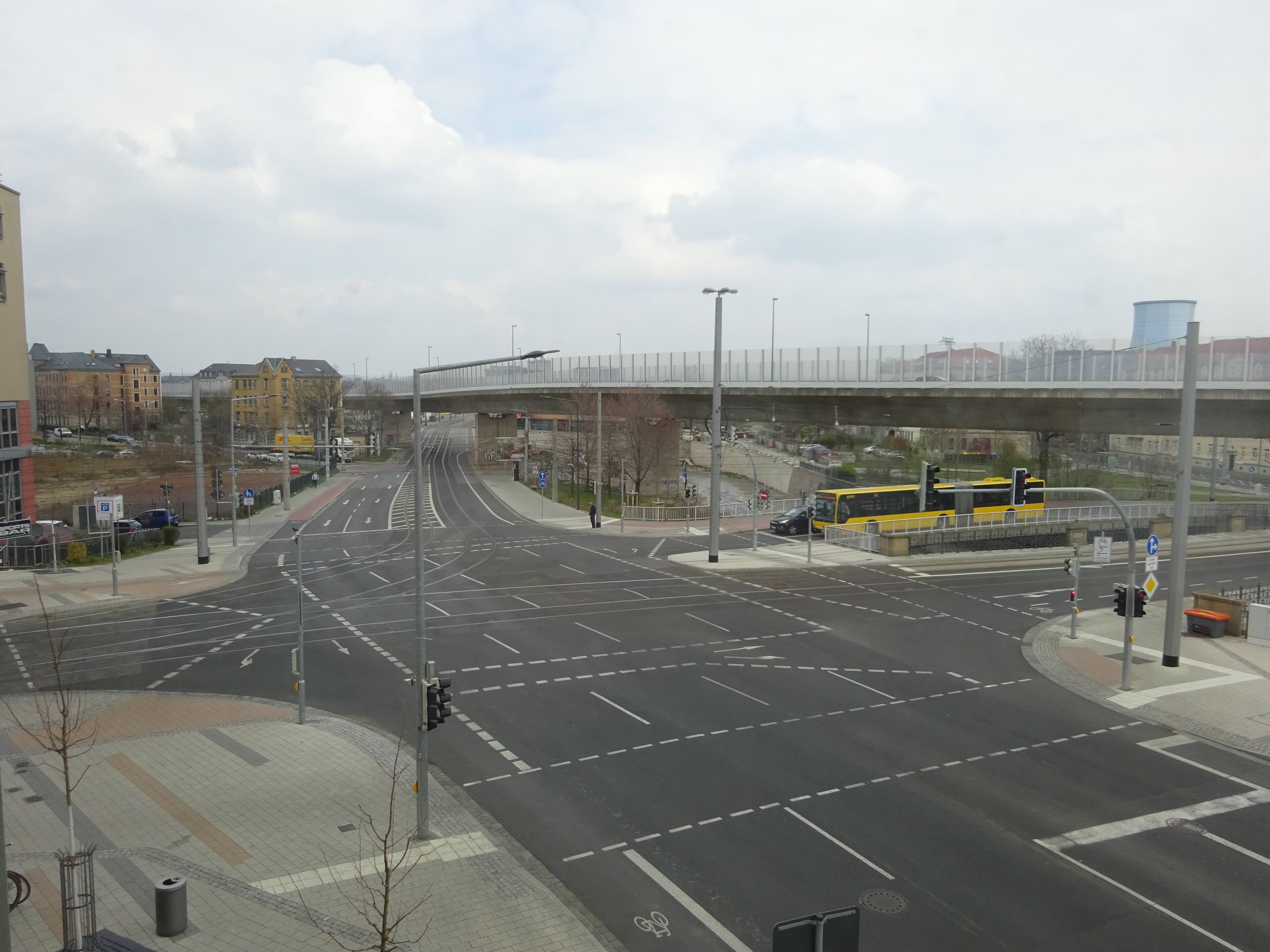 Kreuzung von Kesselsdorfer/Freiberger mit Tharandter/Löbtauer Straße in Dresden im April 2020